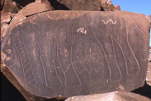 Gravure préhistorique du sud-oranais (Algérie)